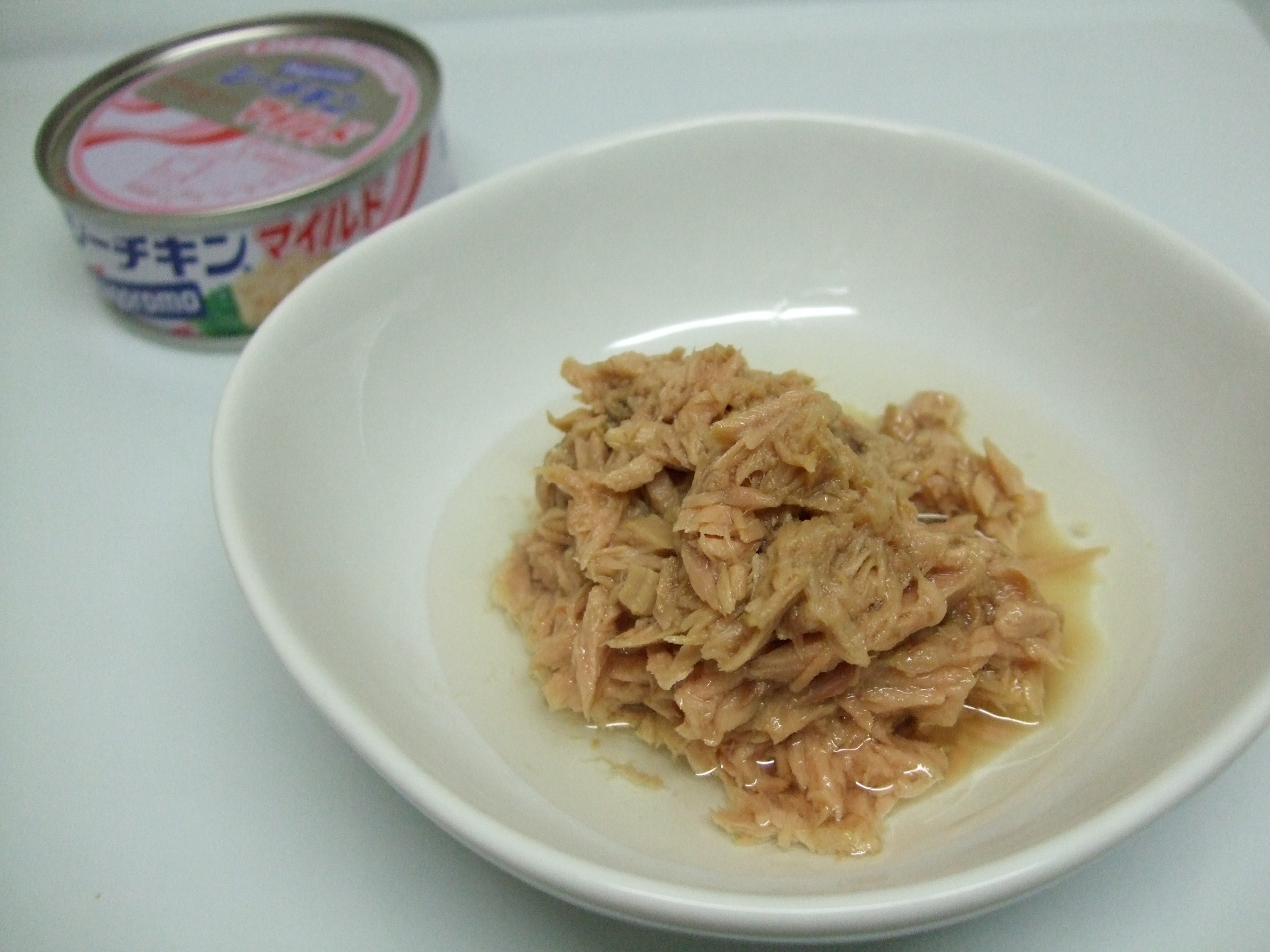 canned tuna シーチキンマイルド (はごろもフーズ)